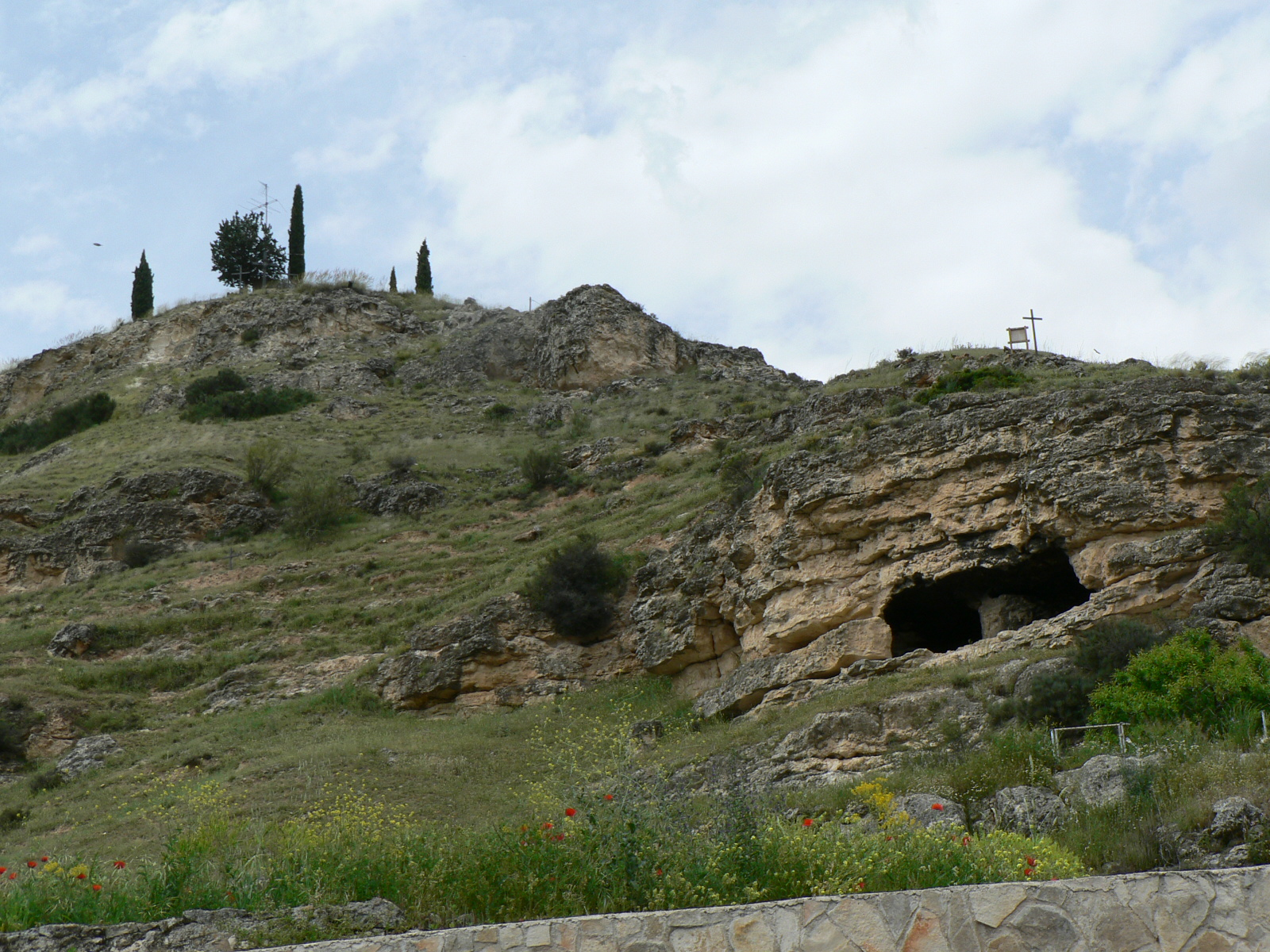 Pastrana, Villa Ducal (Guadalajara, España)